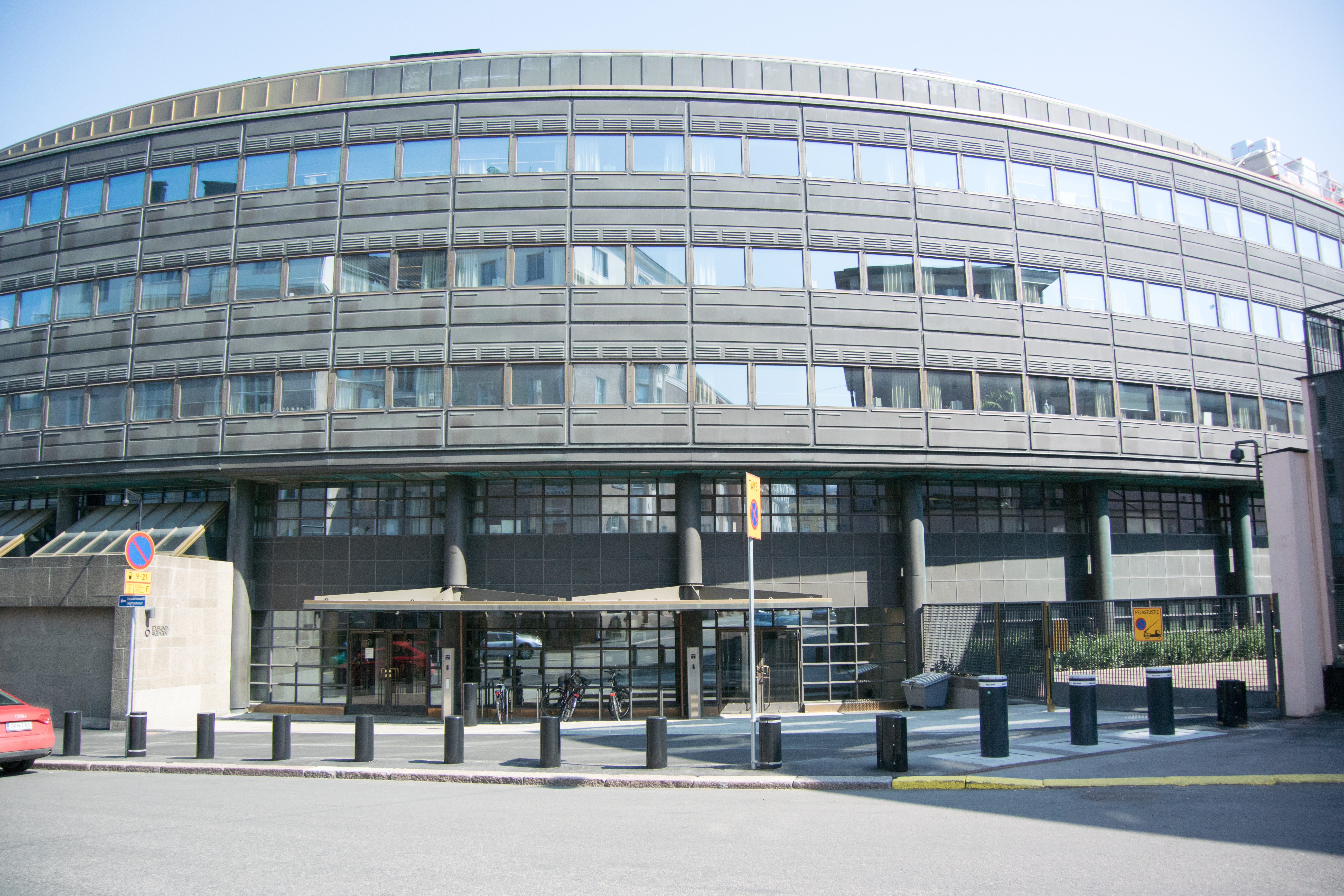 Eduskunnan kirjaston sisäänkäynti vuonna 2014